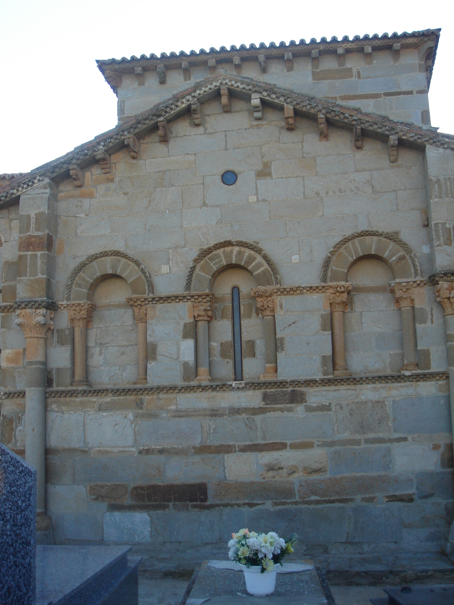 Propiedad de Blas de Paz Martinez.Obtenida en agosto de 2005 y de su propiedad.